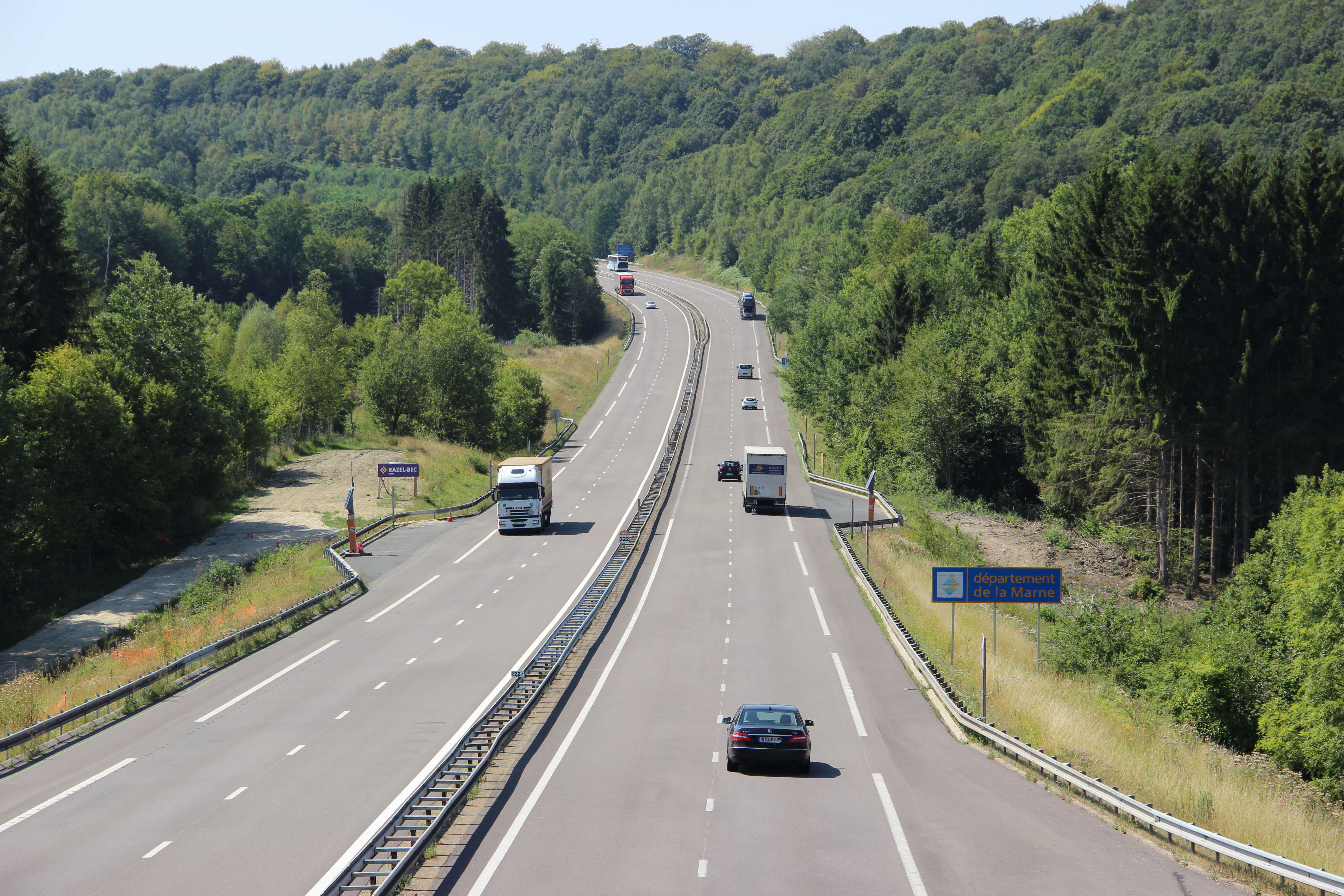 L'autoroute A4 traverse la forêt d'Argonne à hauteur des Islettes (Meuse). Direction Paris.